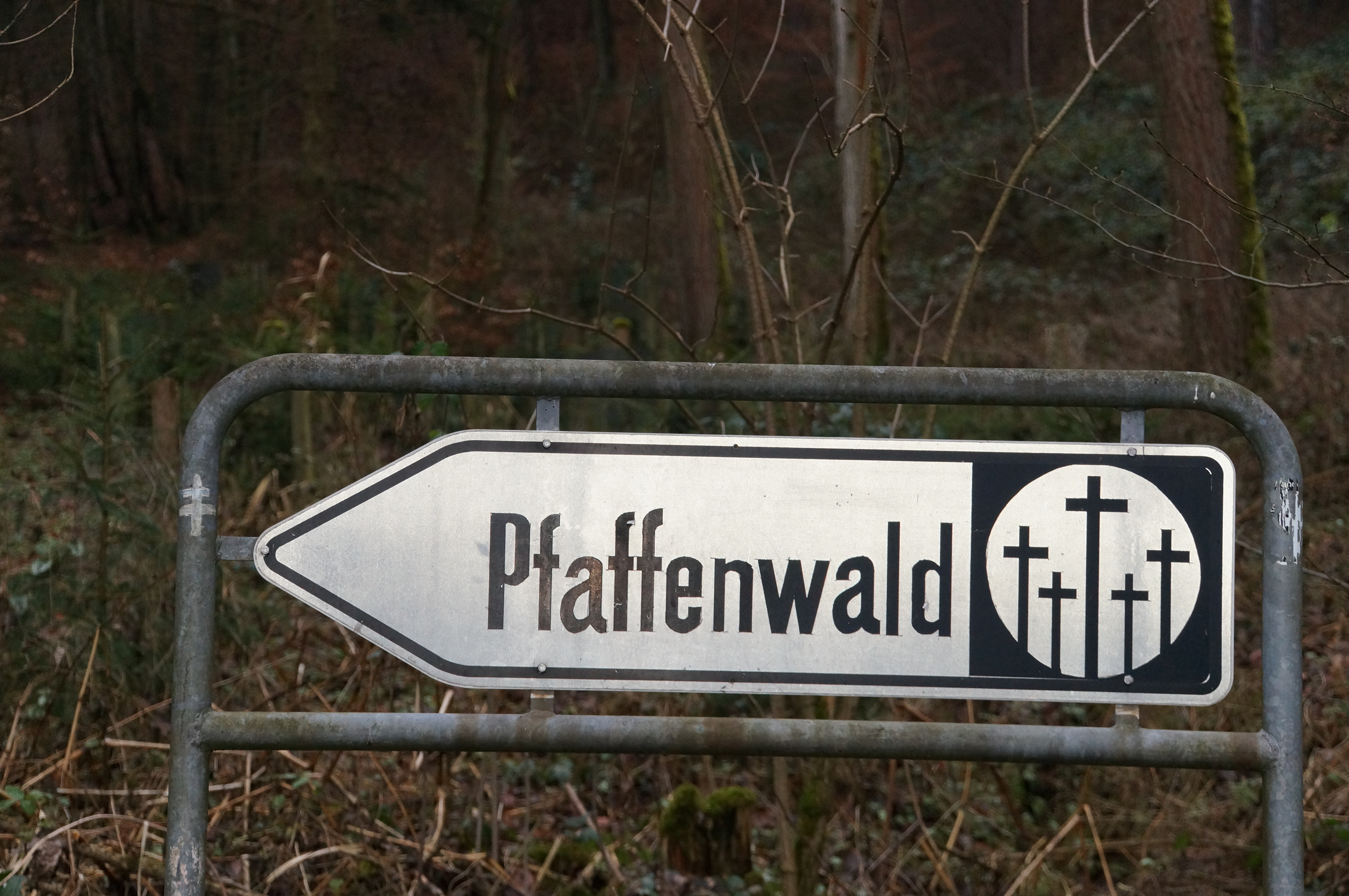 Im Gegensatz zum Lager, das wegen der derzeitigen Beschilderung leider für Ortsunkundige kaum zu finden ist, ist der Weg zum Friedhof gut ausgeschildert.